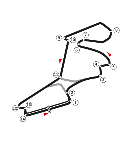 Istanbul Park